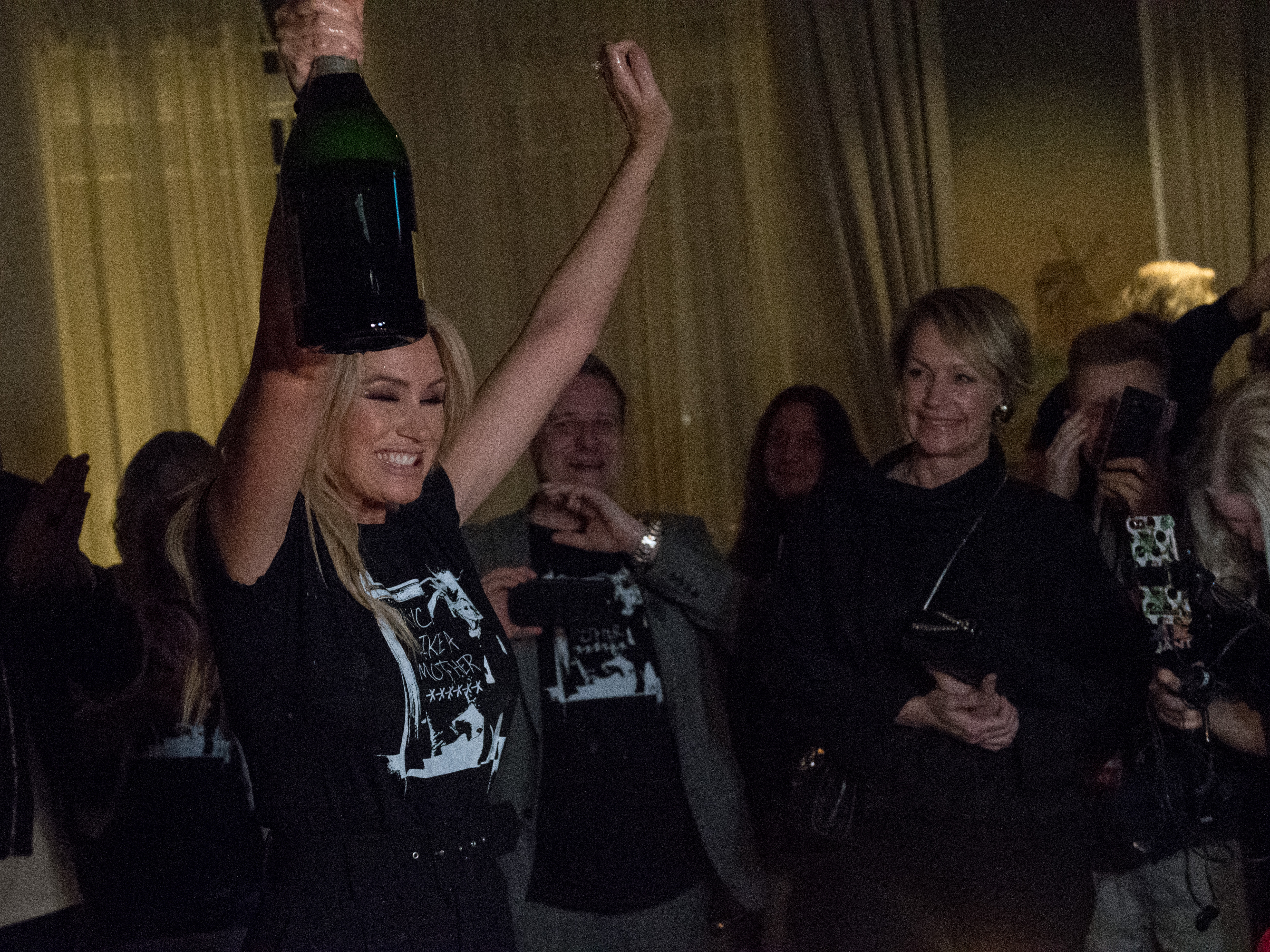 Jessica Andersson öppnar champagnen på efterfesten.